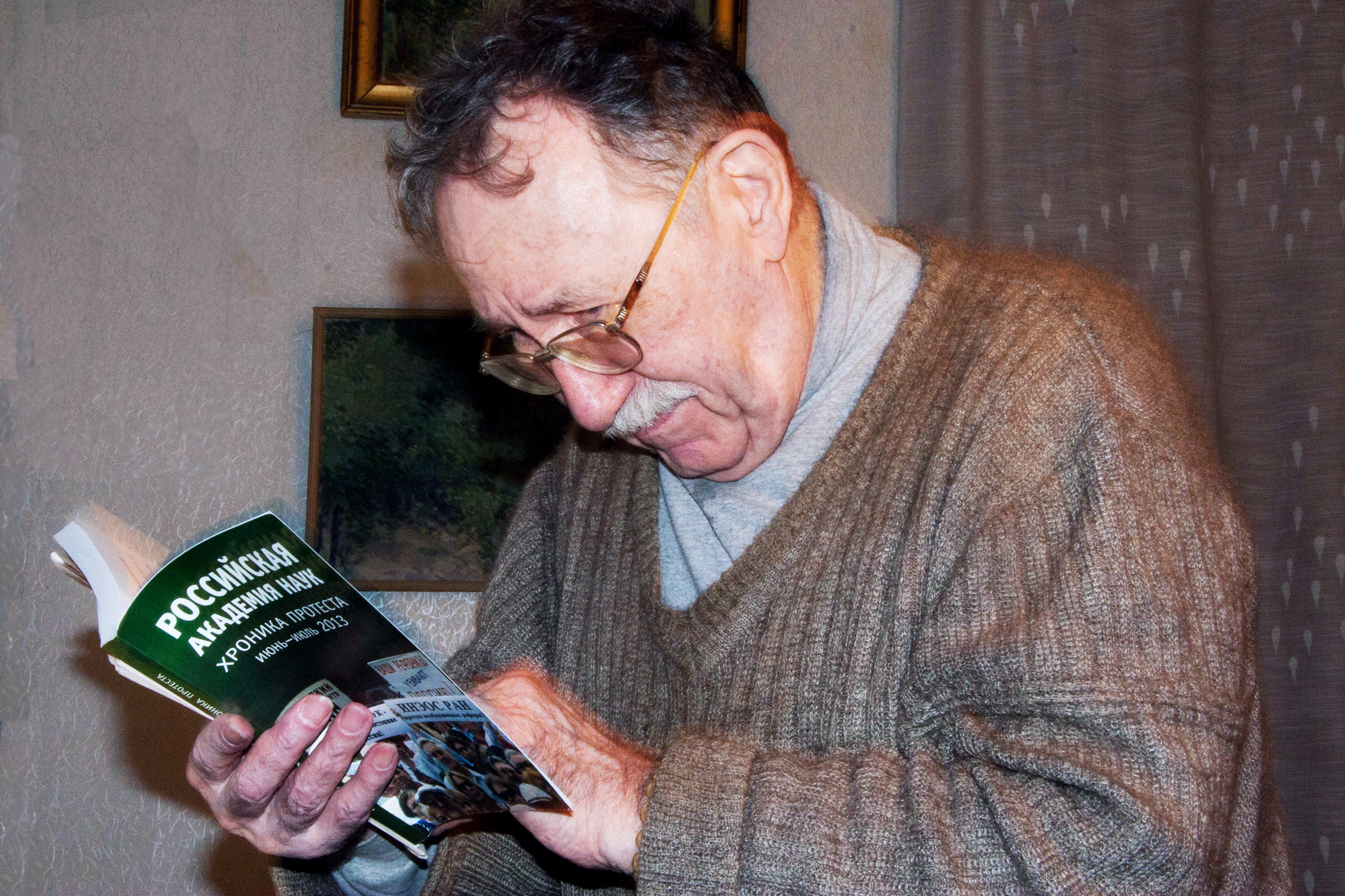 Фотография учёного Павла Михайловича Кожина.